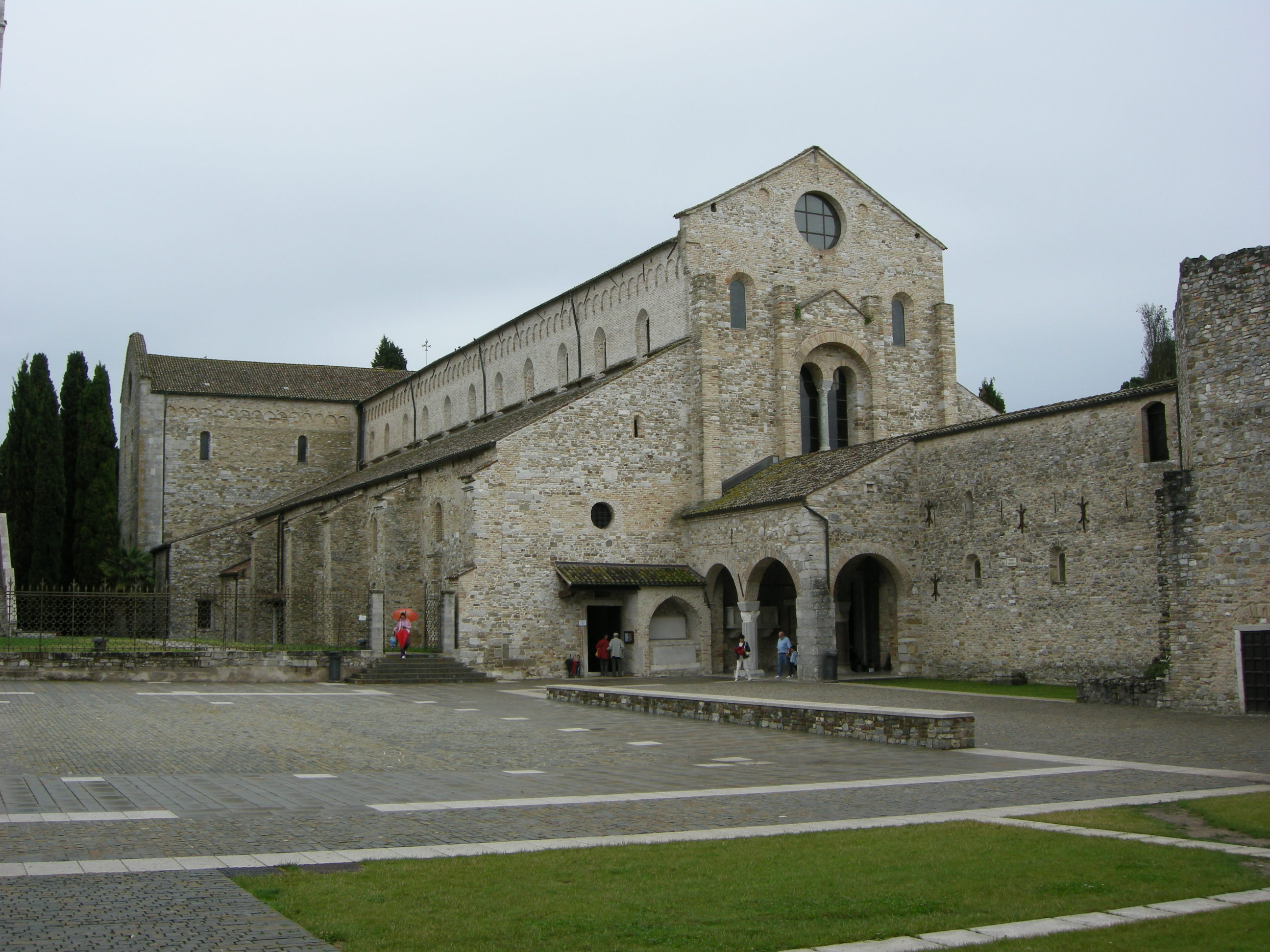 Basilica di aquilieia, esterno